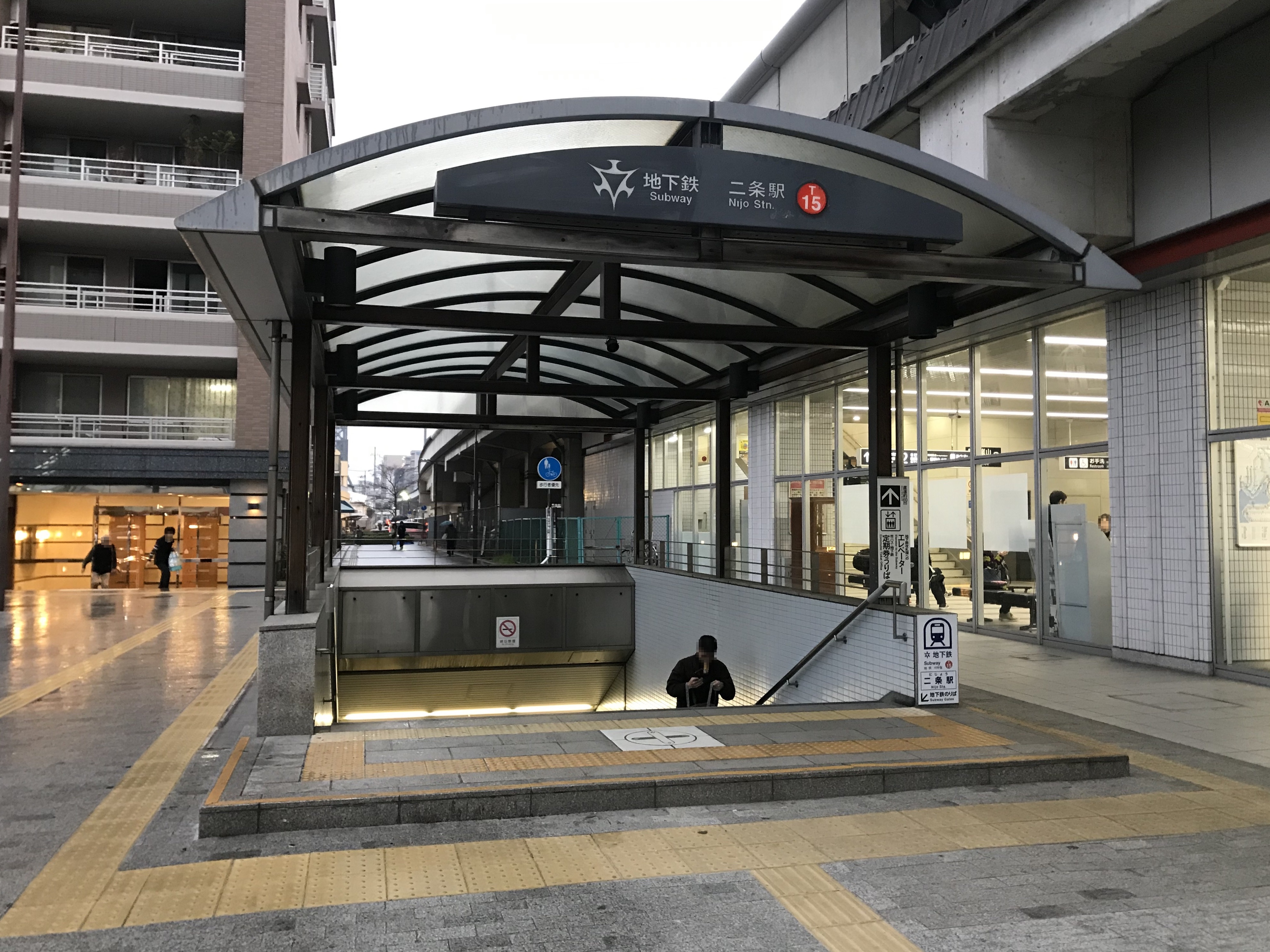 JR二条駅前の地下鉄二条駅の入り口